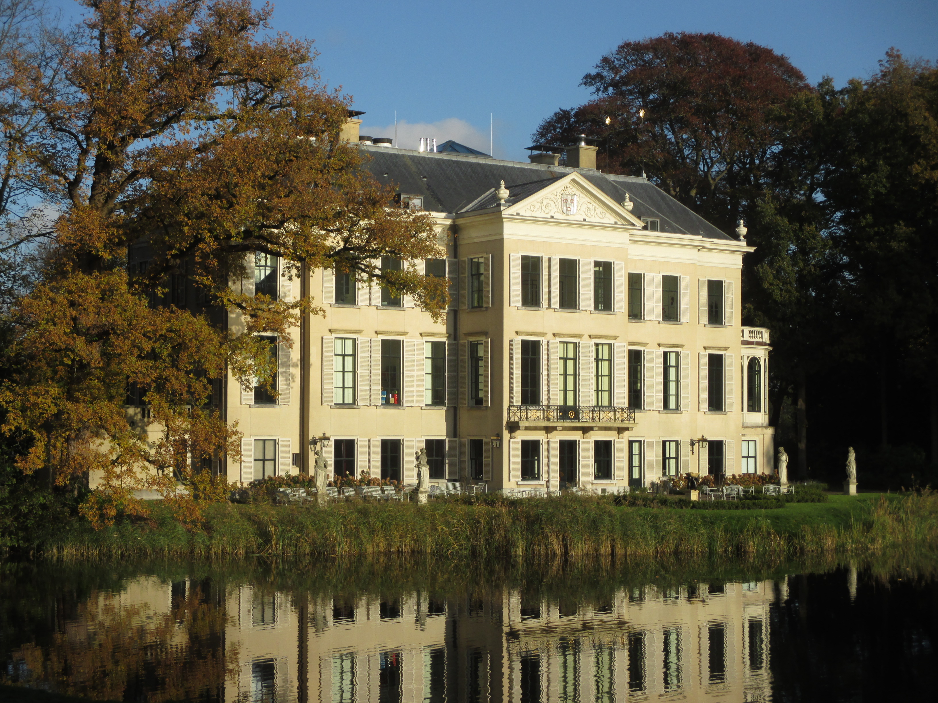 Kasteel Broekhuizen, Leersum. Achterzijde (Zuiden)